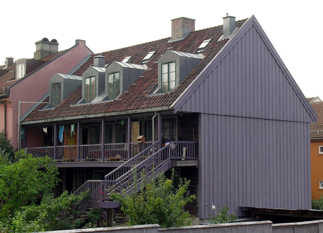 Øvre gate 2B, Oslo, Norway.